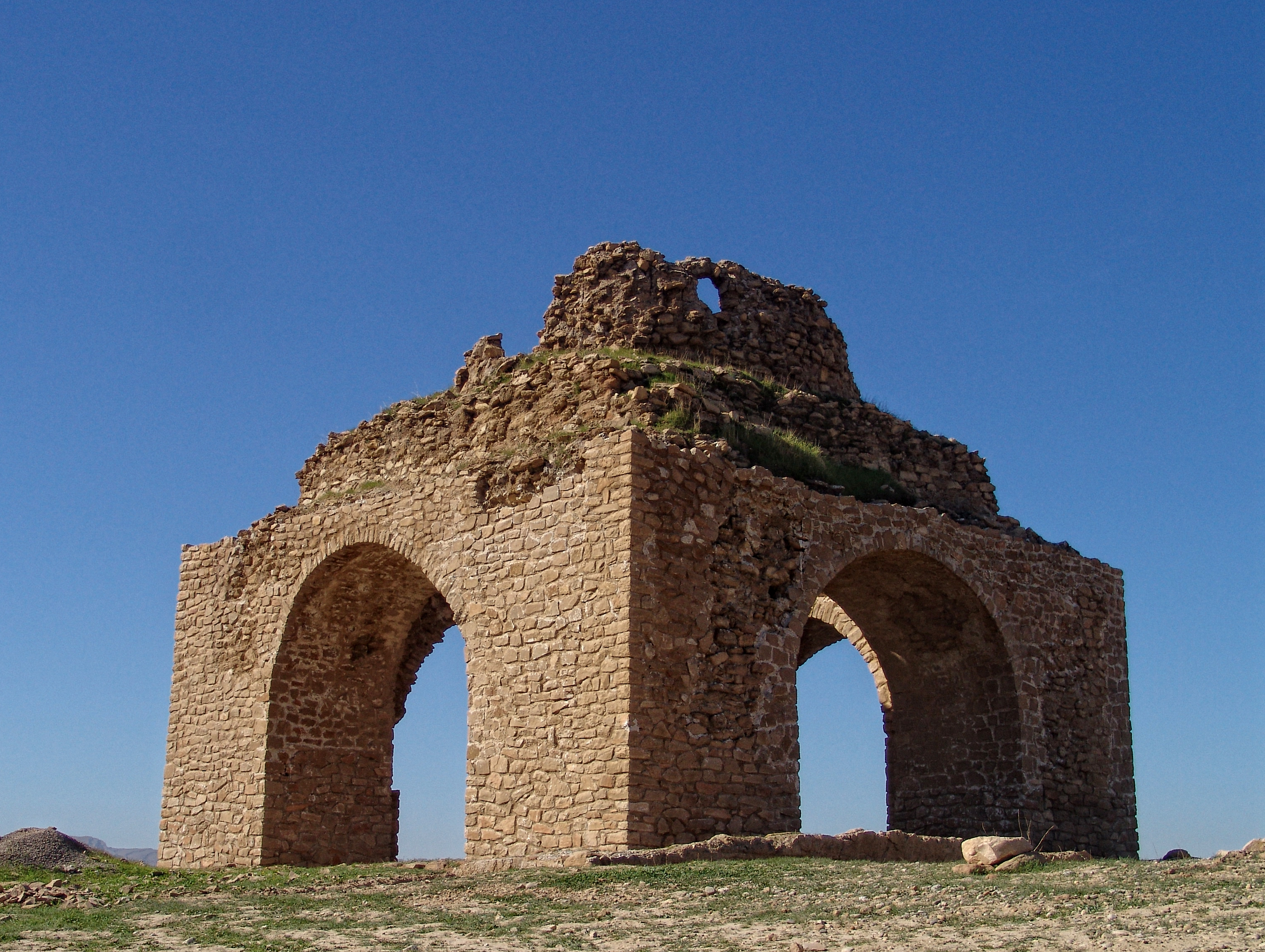 چهارطاقی خیرآباد در روستای خیرآباد، دهدشت